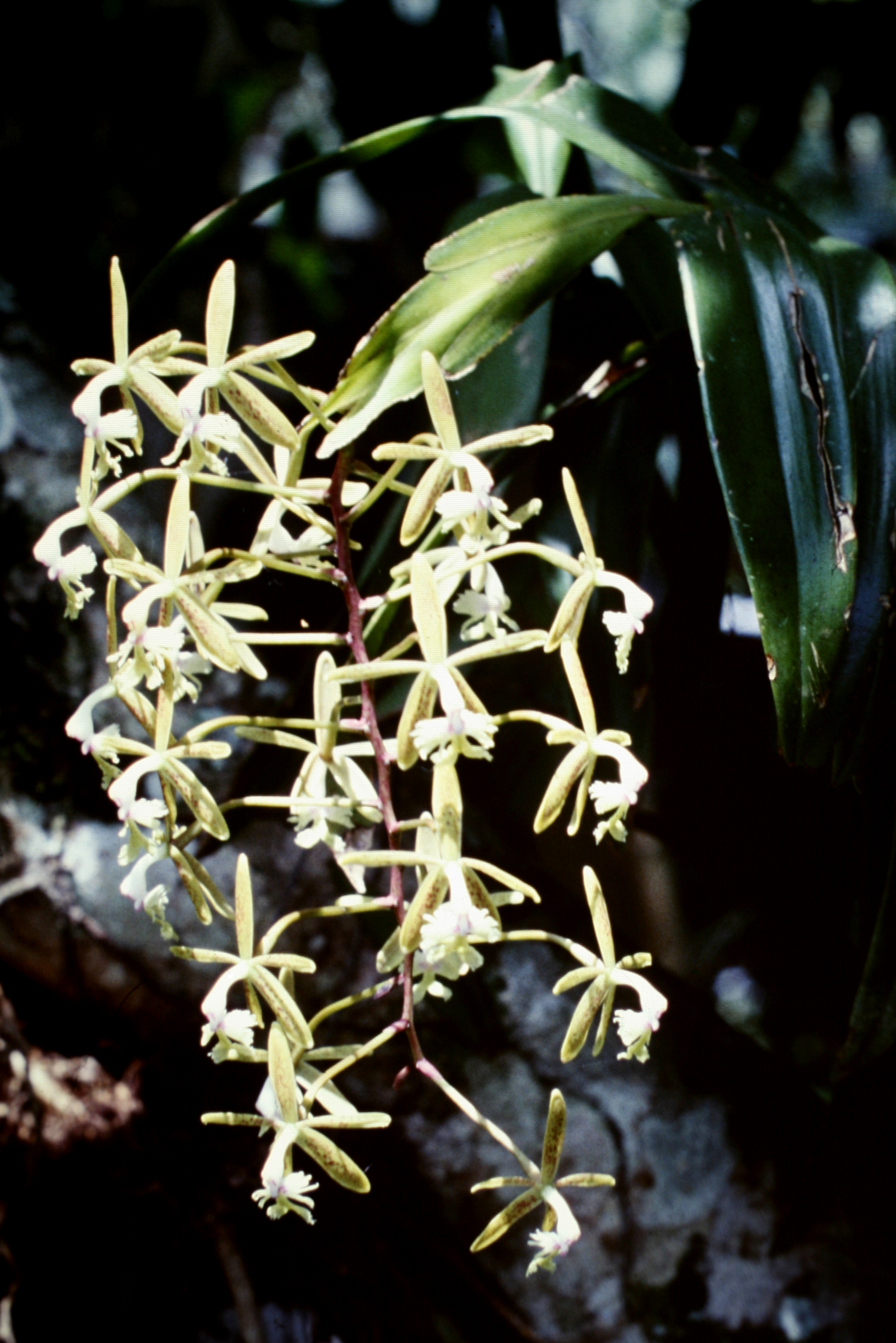 Epidendrum cristatum , Suriname.